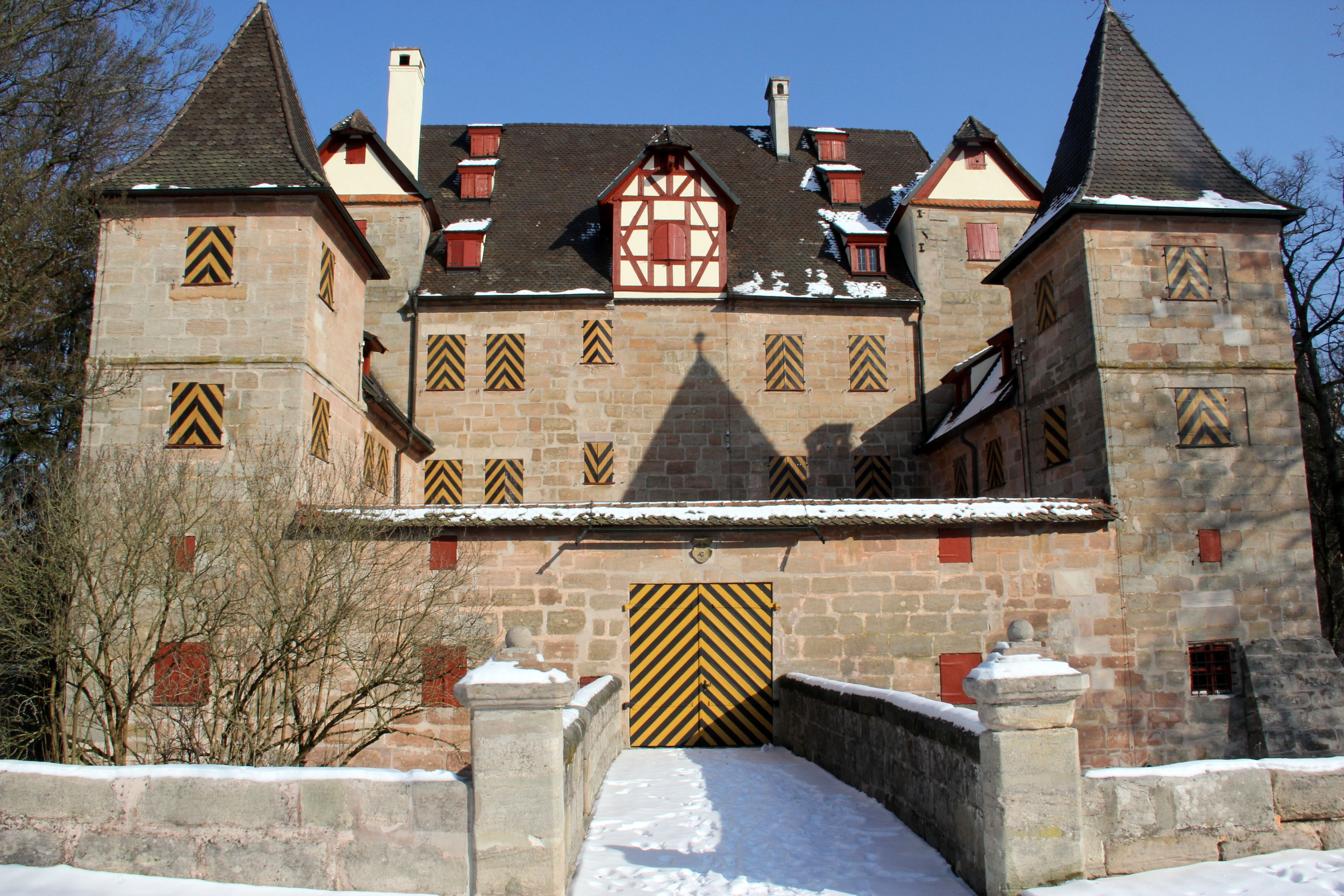 Schwarzenbruck, Petz'sche Schloss